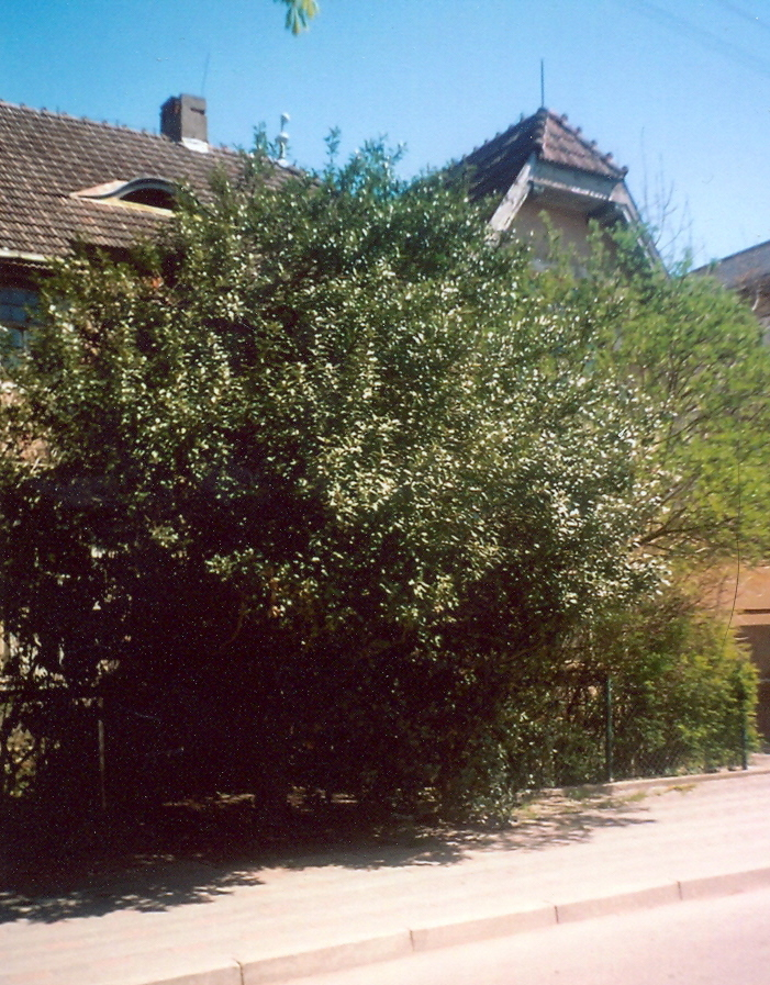 Ostrokrzew w Rewalu